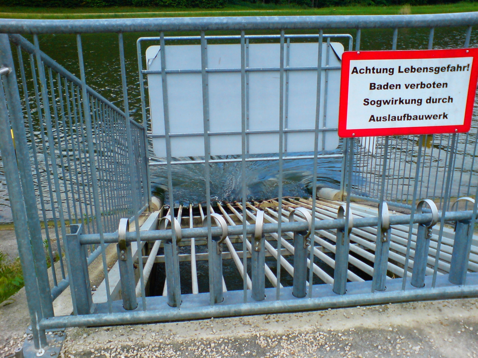 Ausleitbauwerk zum MDK - Entlastungskraftwerk bei Neuses